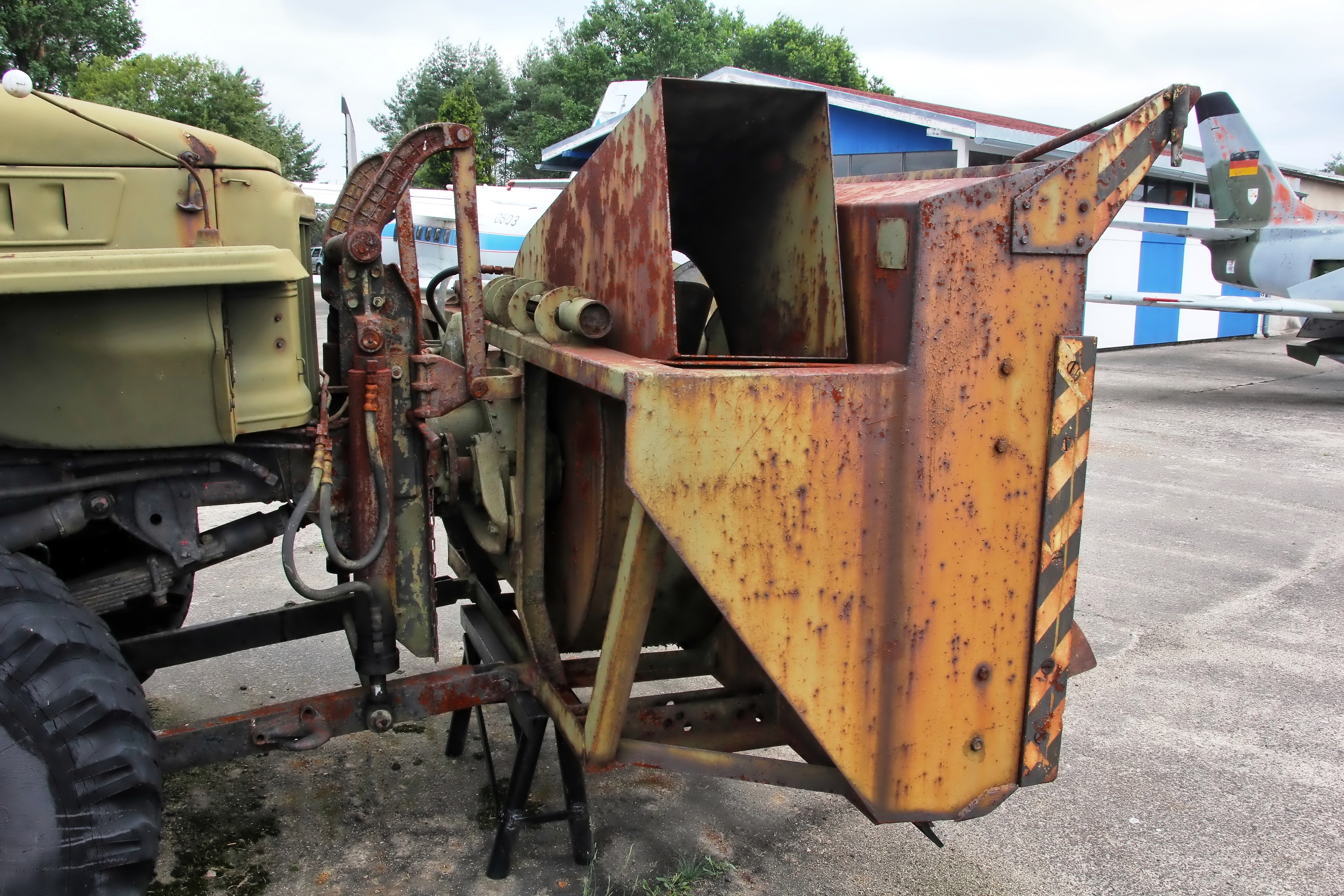 Schneefräse D-902 auf Ural-375E im Luftfahrttechnischen Museum Rothenburg, Seitenansicht Fräswerk.